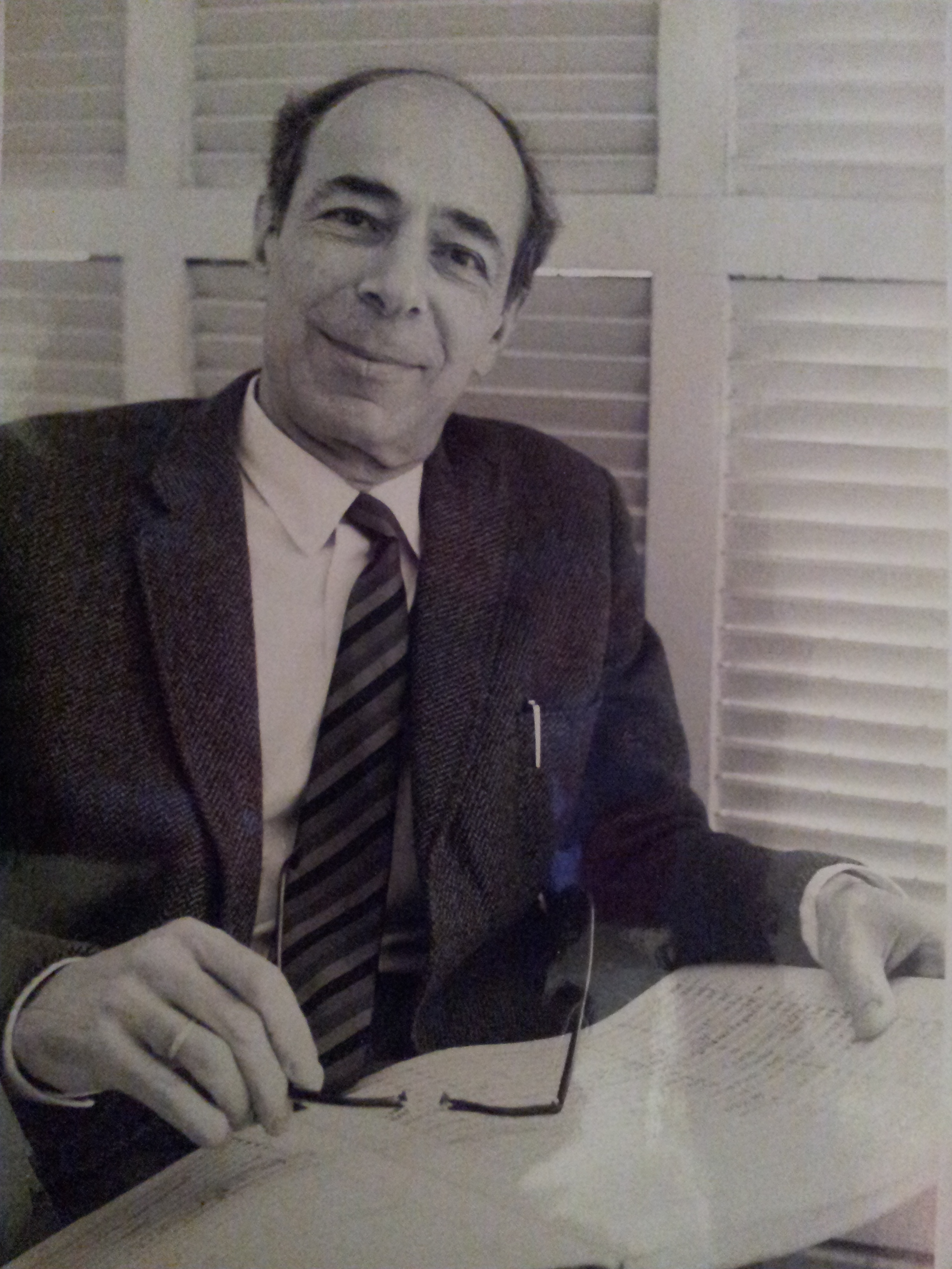 חנוך יעקובי